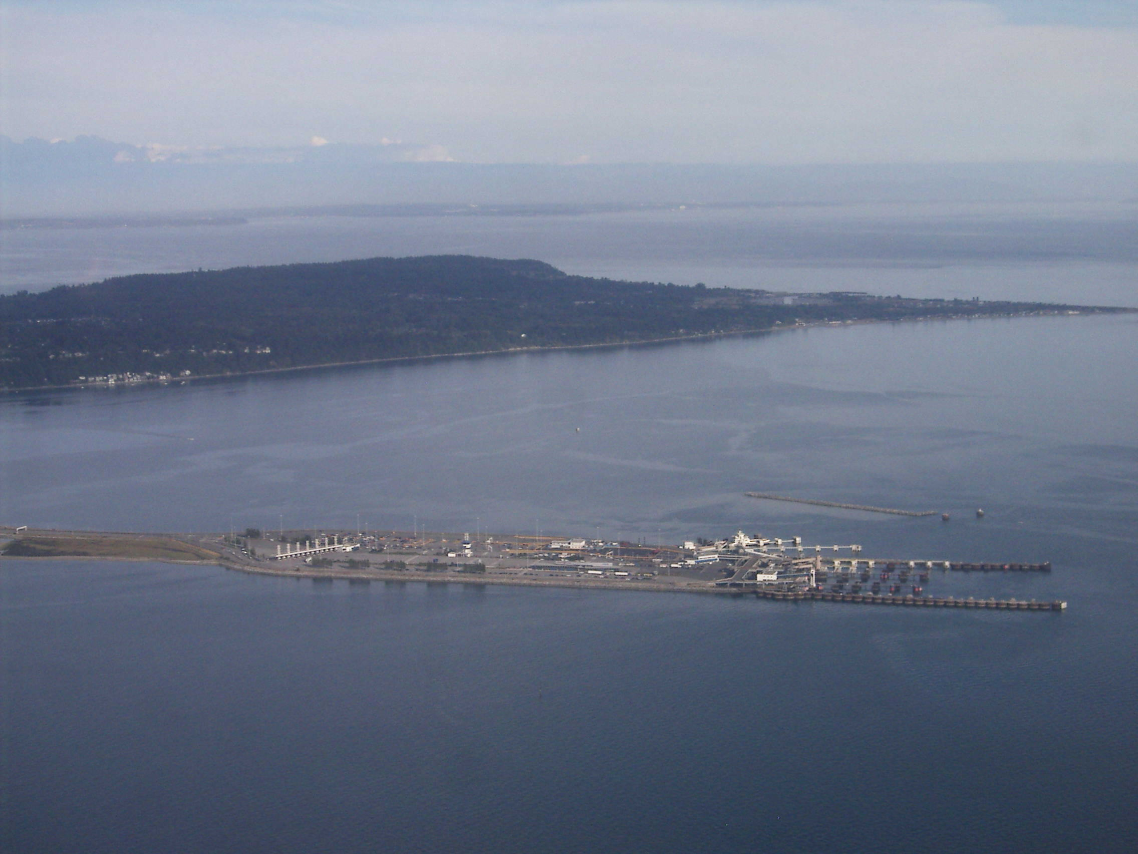 Tsawwassen Ferry Terminal in Delta, British Columbia, Kanada